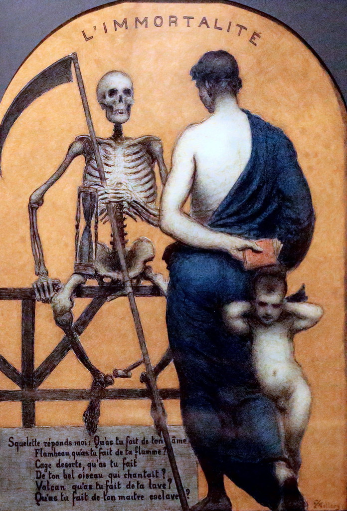 Inmortalidad, de Xavier Mellery, no datado, Museos Reales de Bellas Artes de Bélgica, Bruselas.